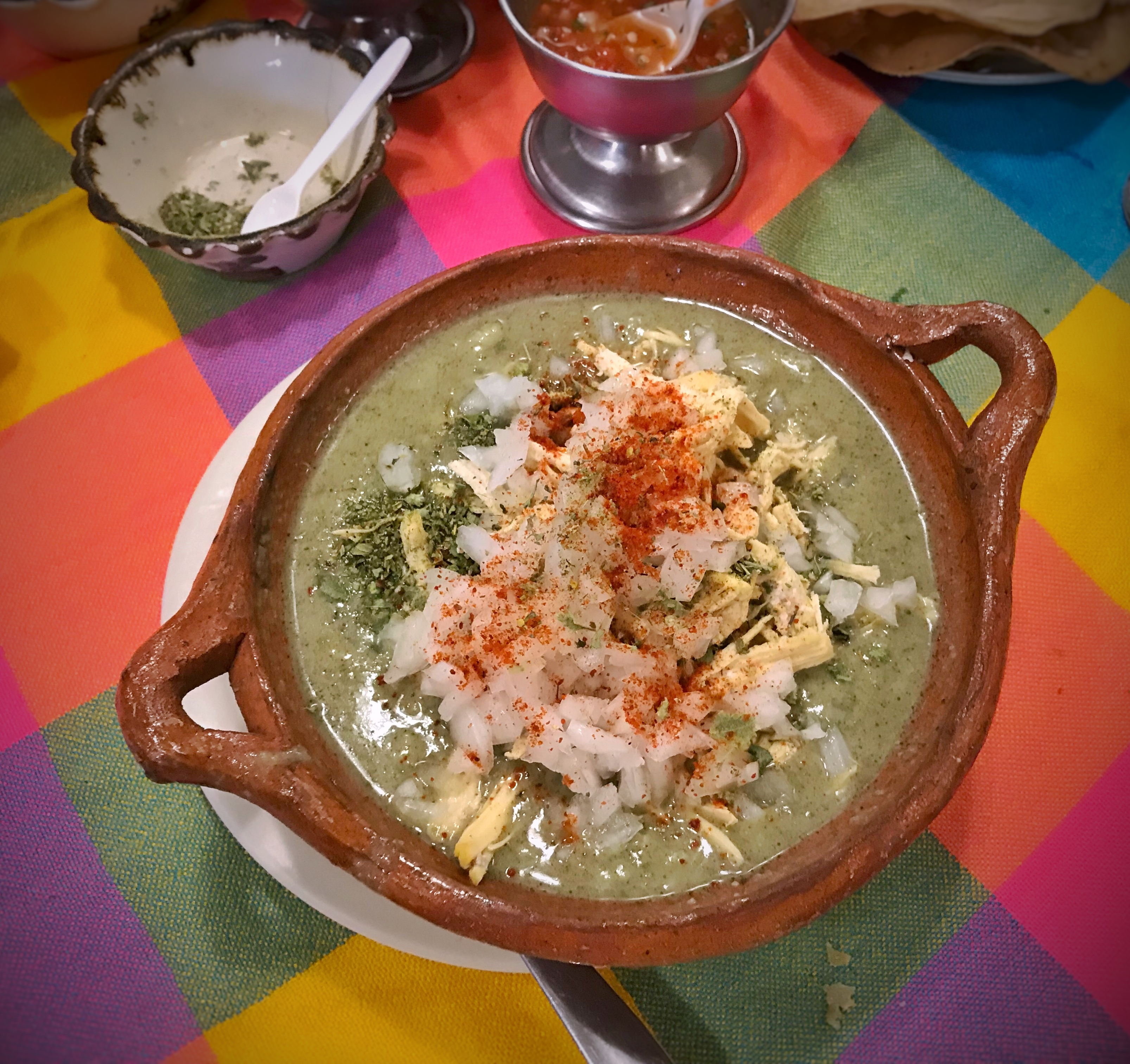 Los Tolucos, Algarín, CDMX, Mexico.